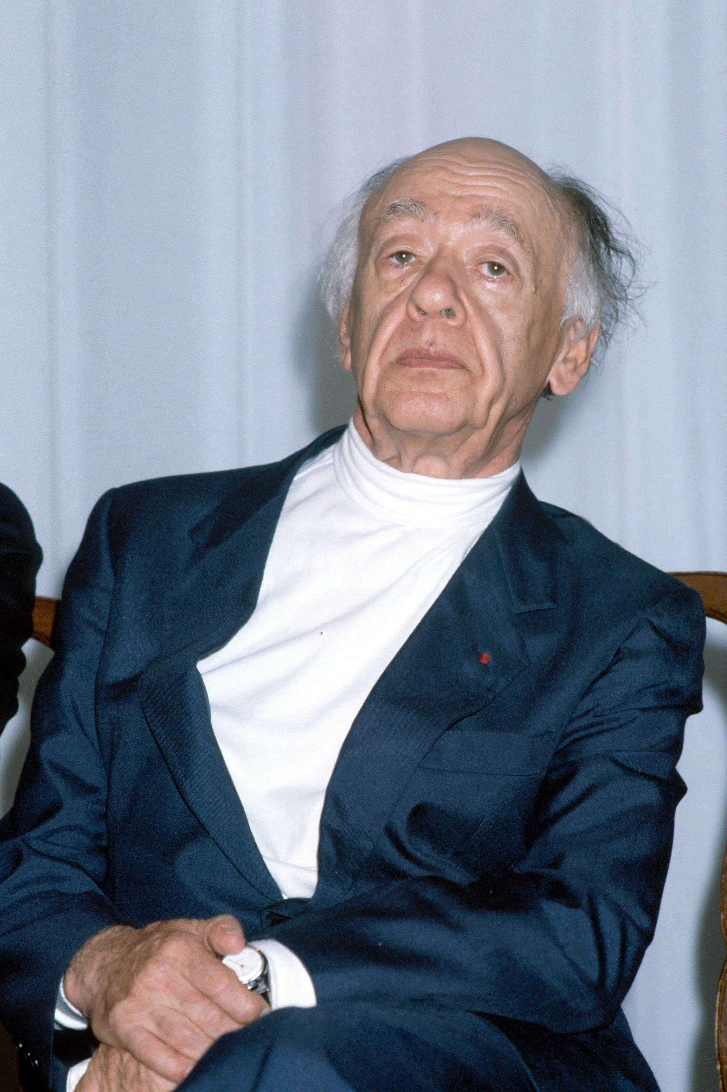 Lo scrittore e drammaturgo Eugene Ionesco, membro della giuria della Mostra del Cinema di Venezia del 1985